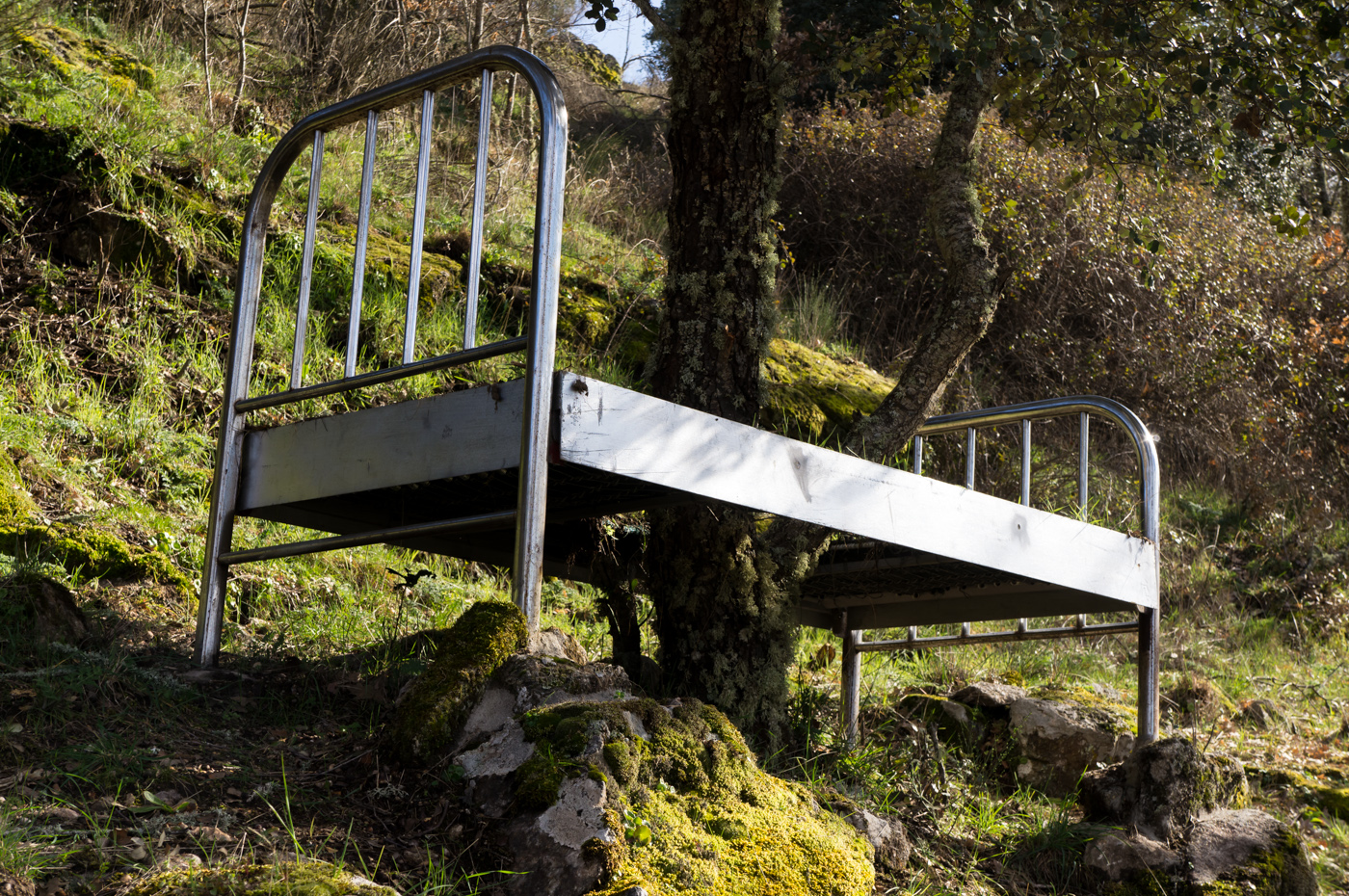 Sierra de Francia, Salamanca